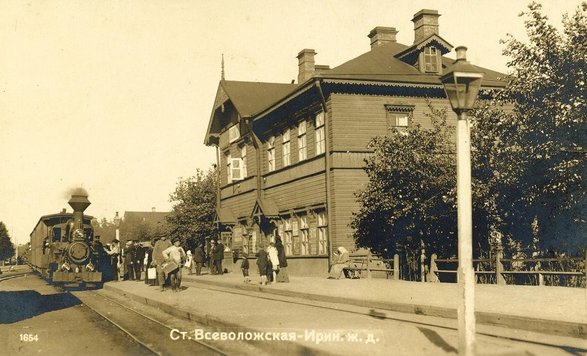 Станция Всеволожская Ириновской ЖД